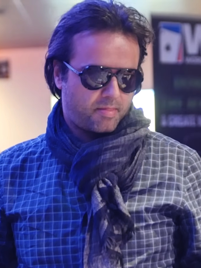 Fabrice Soulier bei der WPT Amsterdam 2017